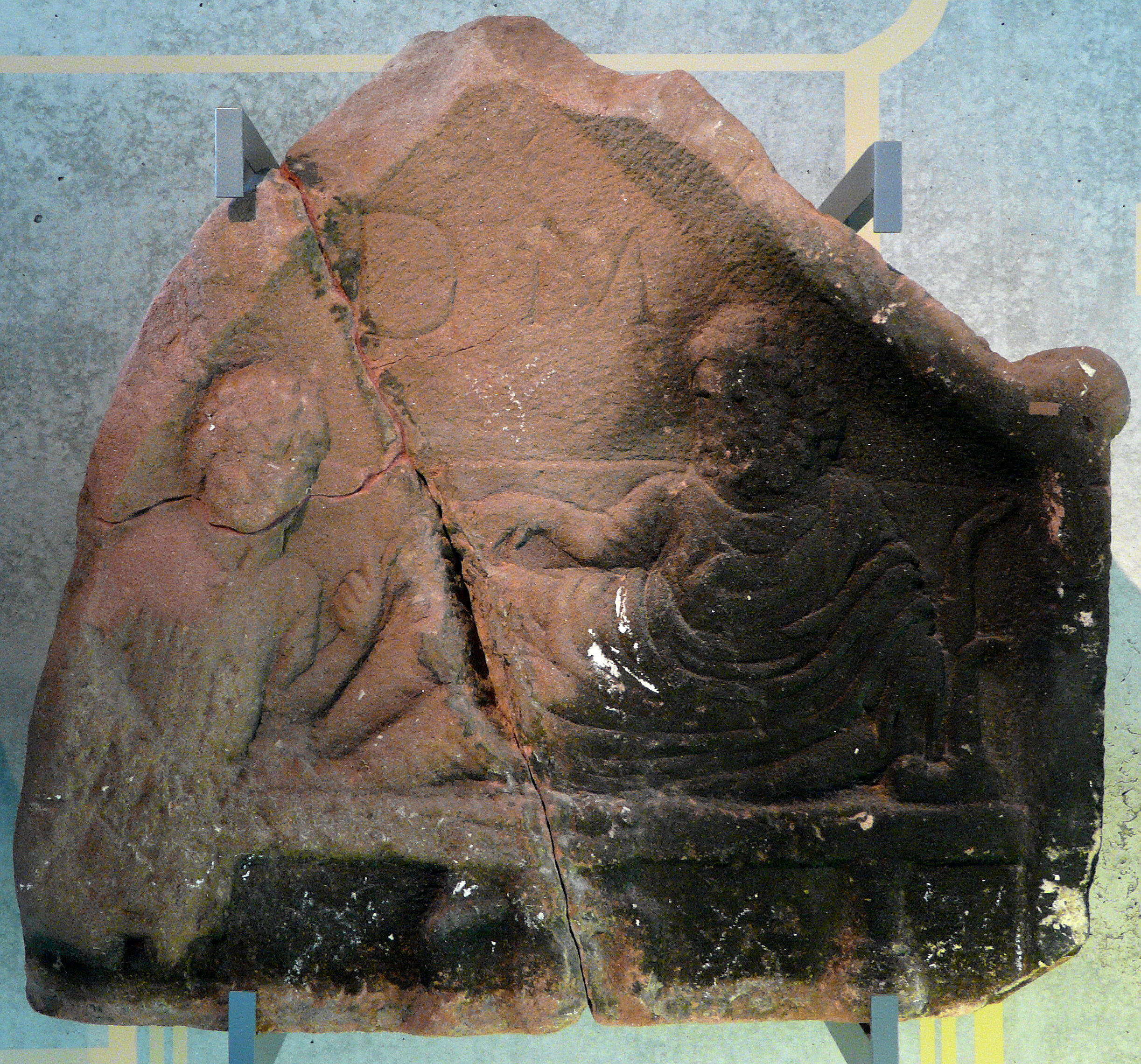 1848 entdeckter Grabstein mit Totenmahlszene aus Schloßau, 2. Jahrhundert. Römermuseum Osterburken